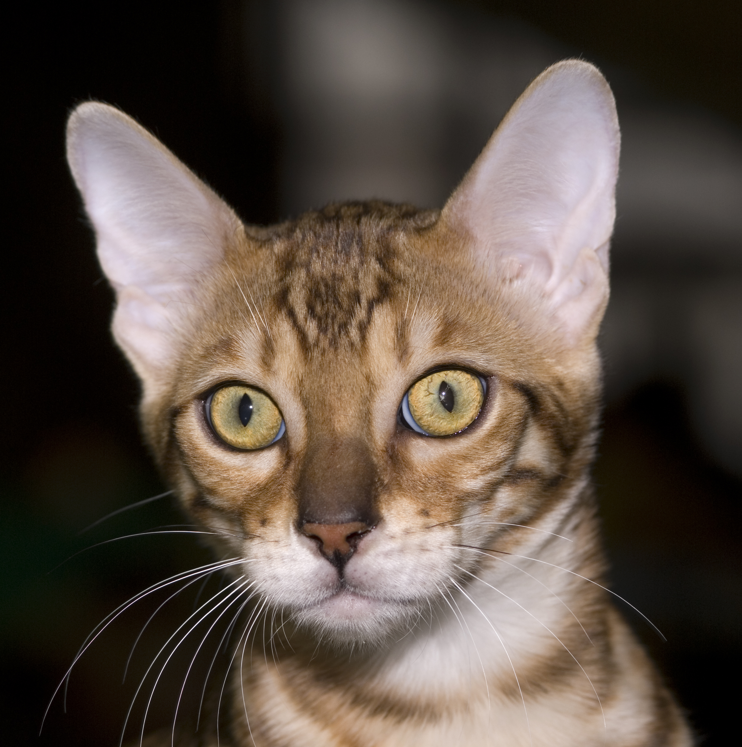 Бенгальский кот Prince MoonLight*RU, №965 по каталогу «Гран При Royal Canin». Кот. Окрас: чёрный пятнистый (BEN n 24). Дата рождения: 30/06/2008. Владелец: Н.С.Горюнова. Ярославль